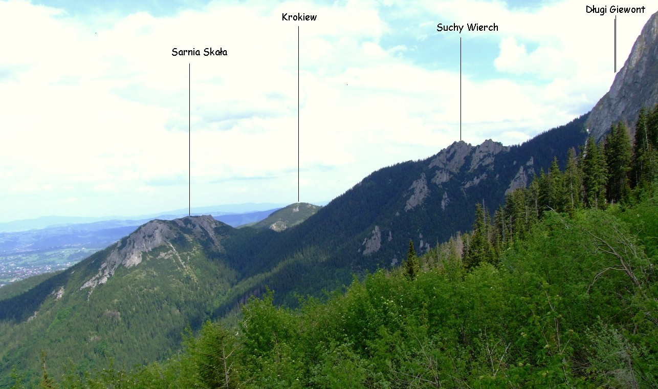 Sarnia Skała, Czerwona Przełęcz i Suchy Wierch. Widok z Grzybowca